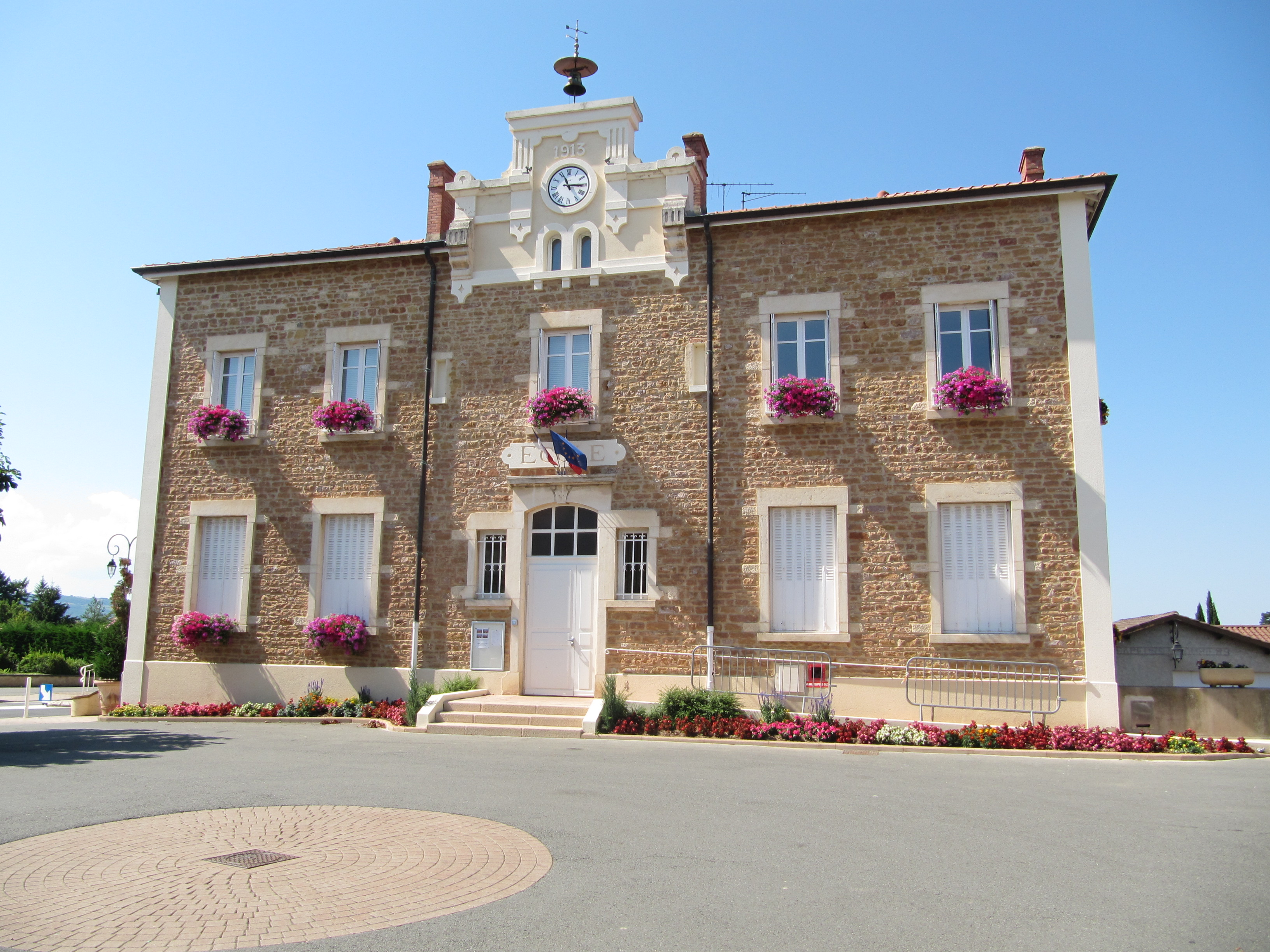 Lachassagne, gemeentehuis